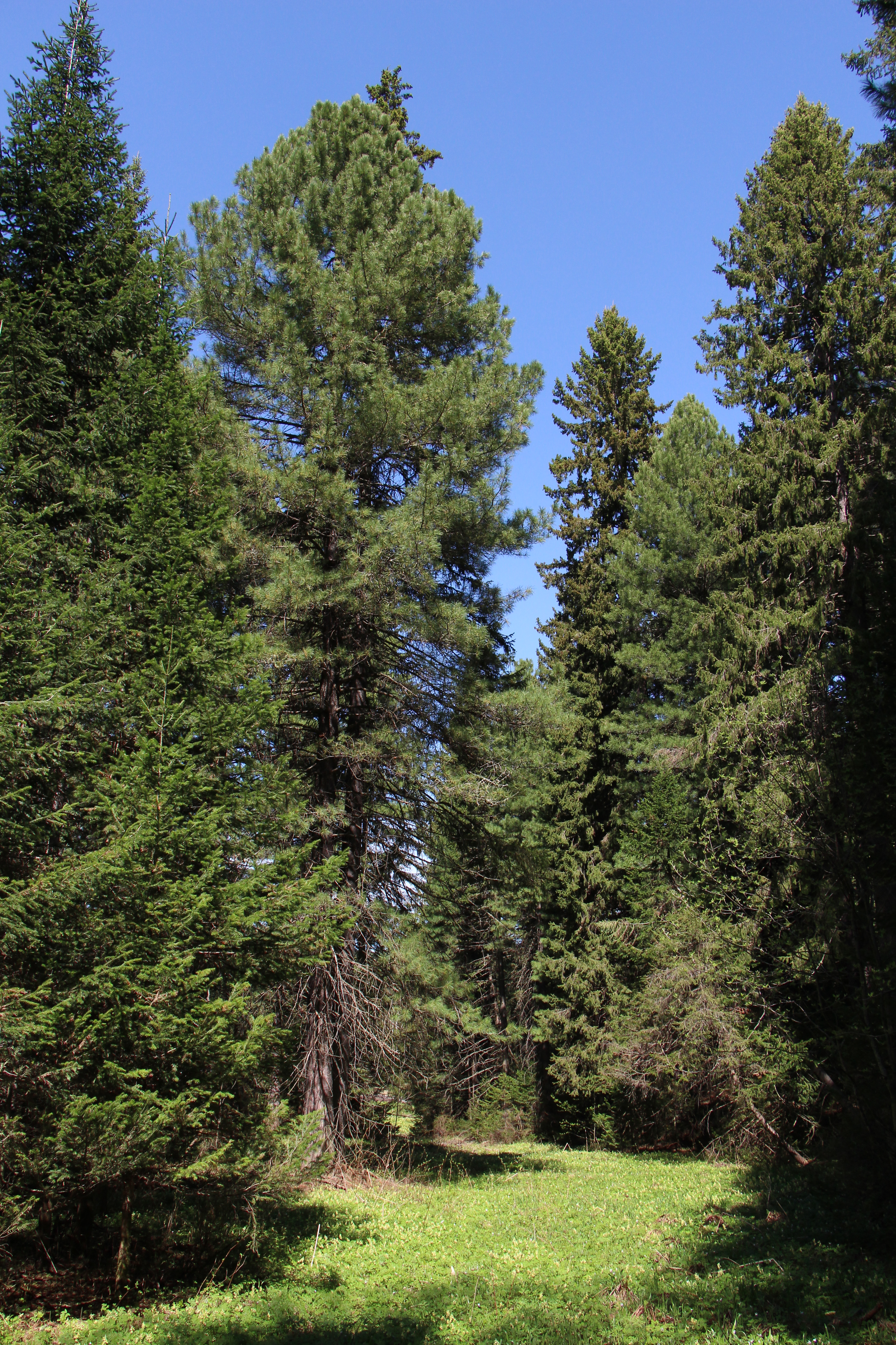 Петуховский припоселковый кедровник: Томский район, Томская область This image is related to the protected area of Russia number 7010283